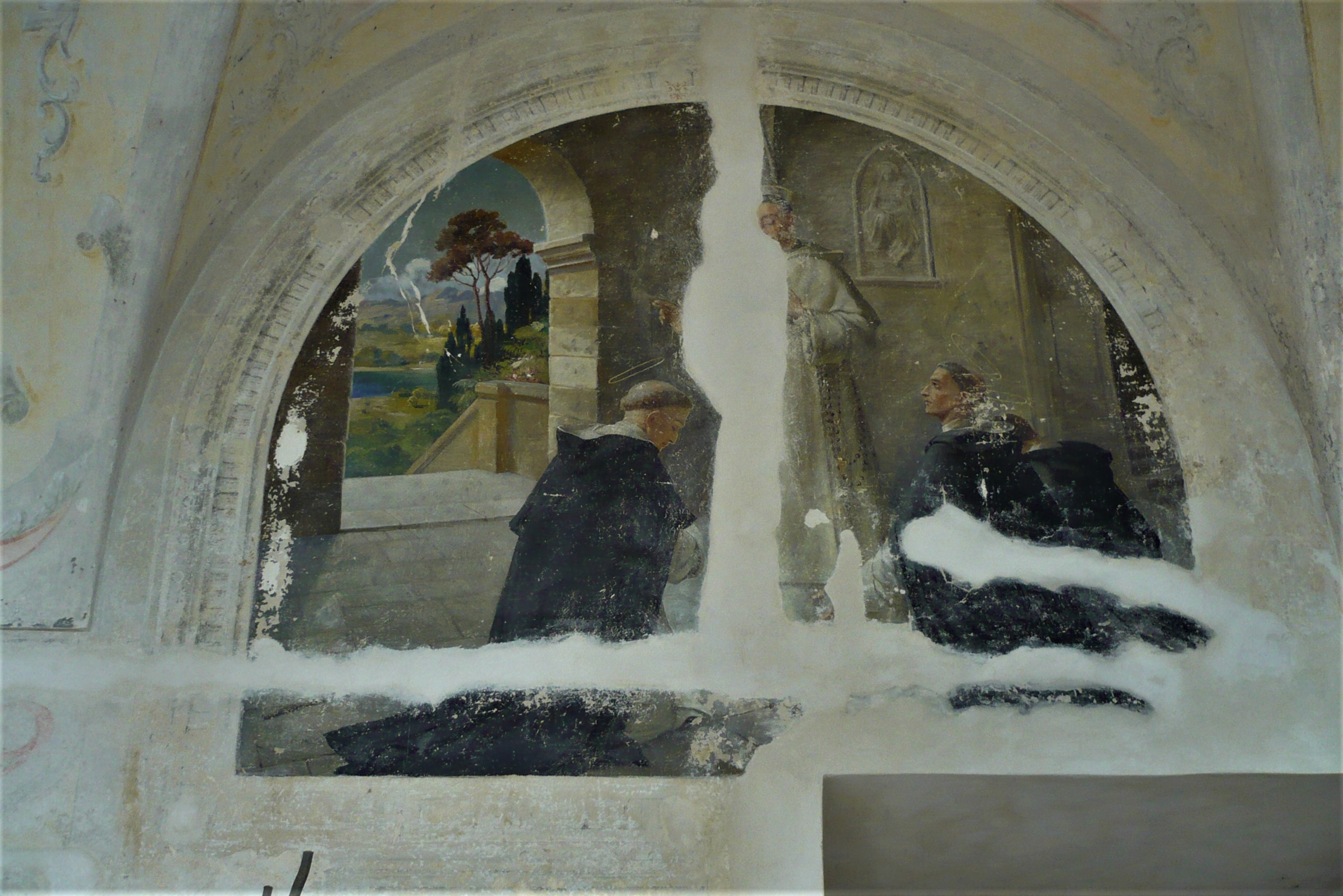 Klasztor dominikanów we Lwowie. Malowidło ścienne